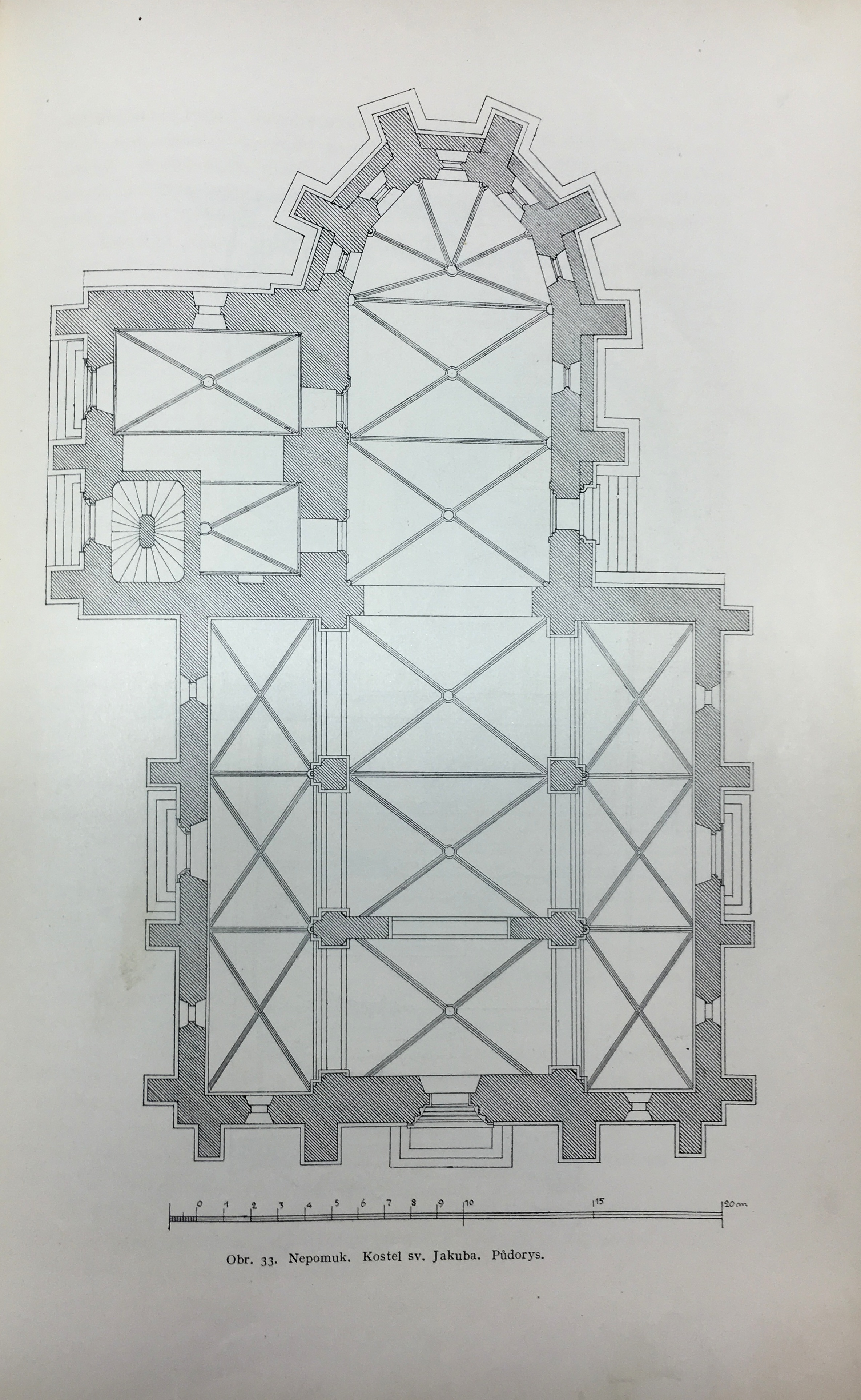 Kostel svatého Jakuba v Nepomuku, půdorys